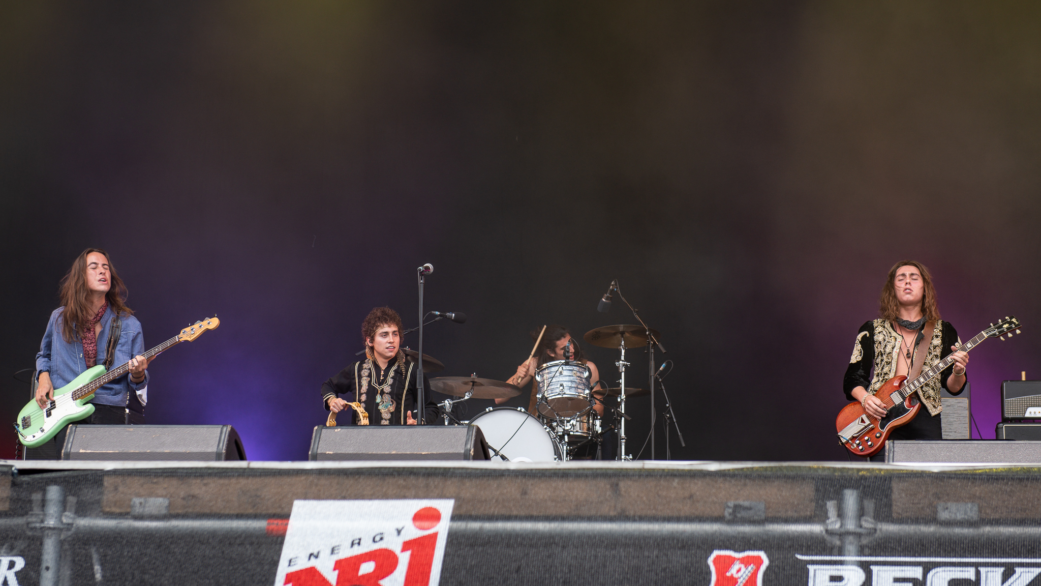 ARGO-Konzerte,Daniel Wagner,Festival,Greta Van Fleet,Jacob Kiszka,Joshua Kiszka,Konzert,Livekonzert,Livemusik,Musik,RiP,Rock im Park 2018,Samuel Kiszka,Zeppelin Stage